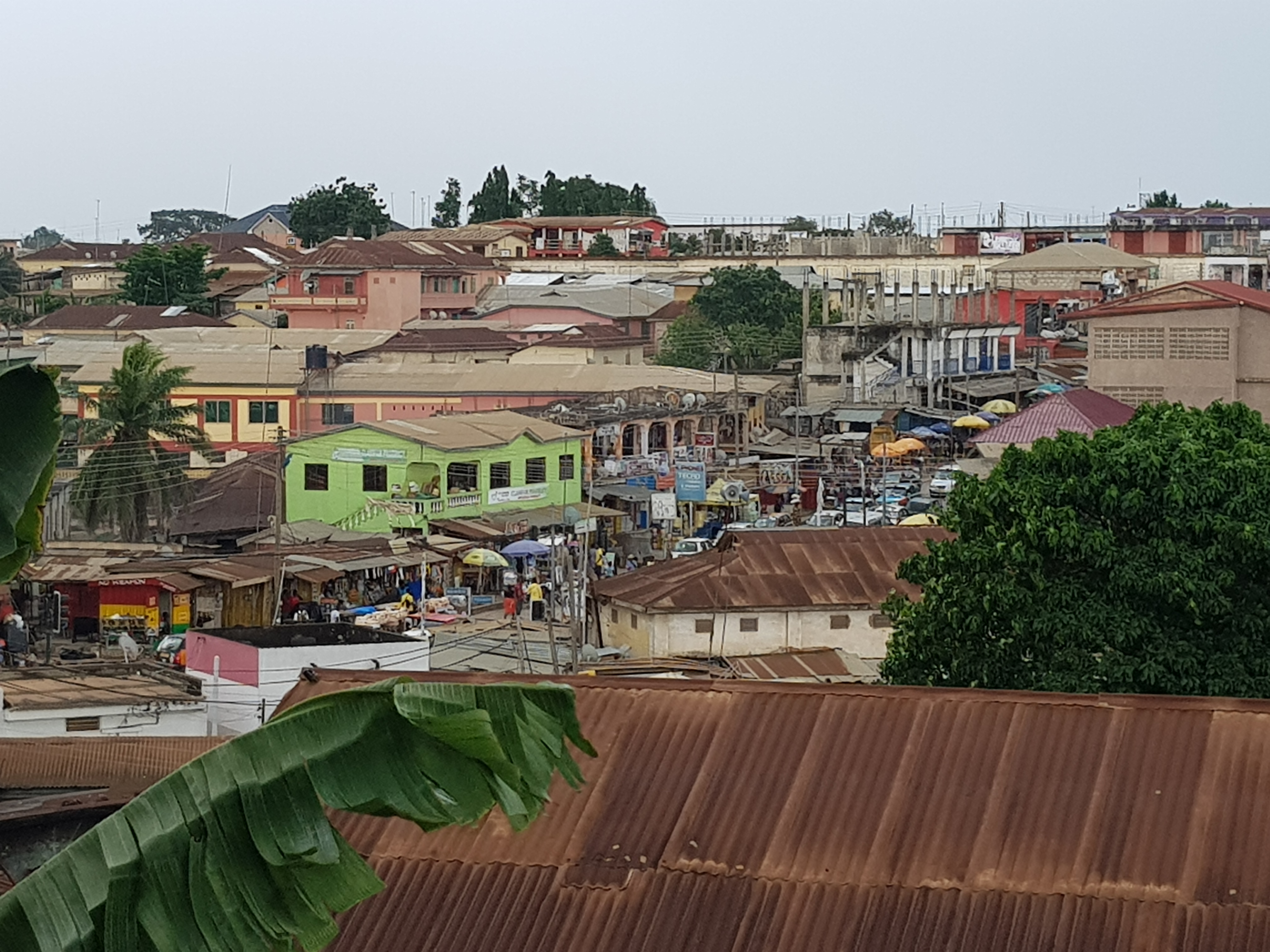 Sicht auf Swedru